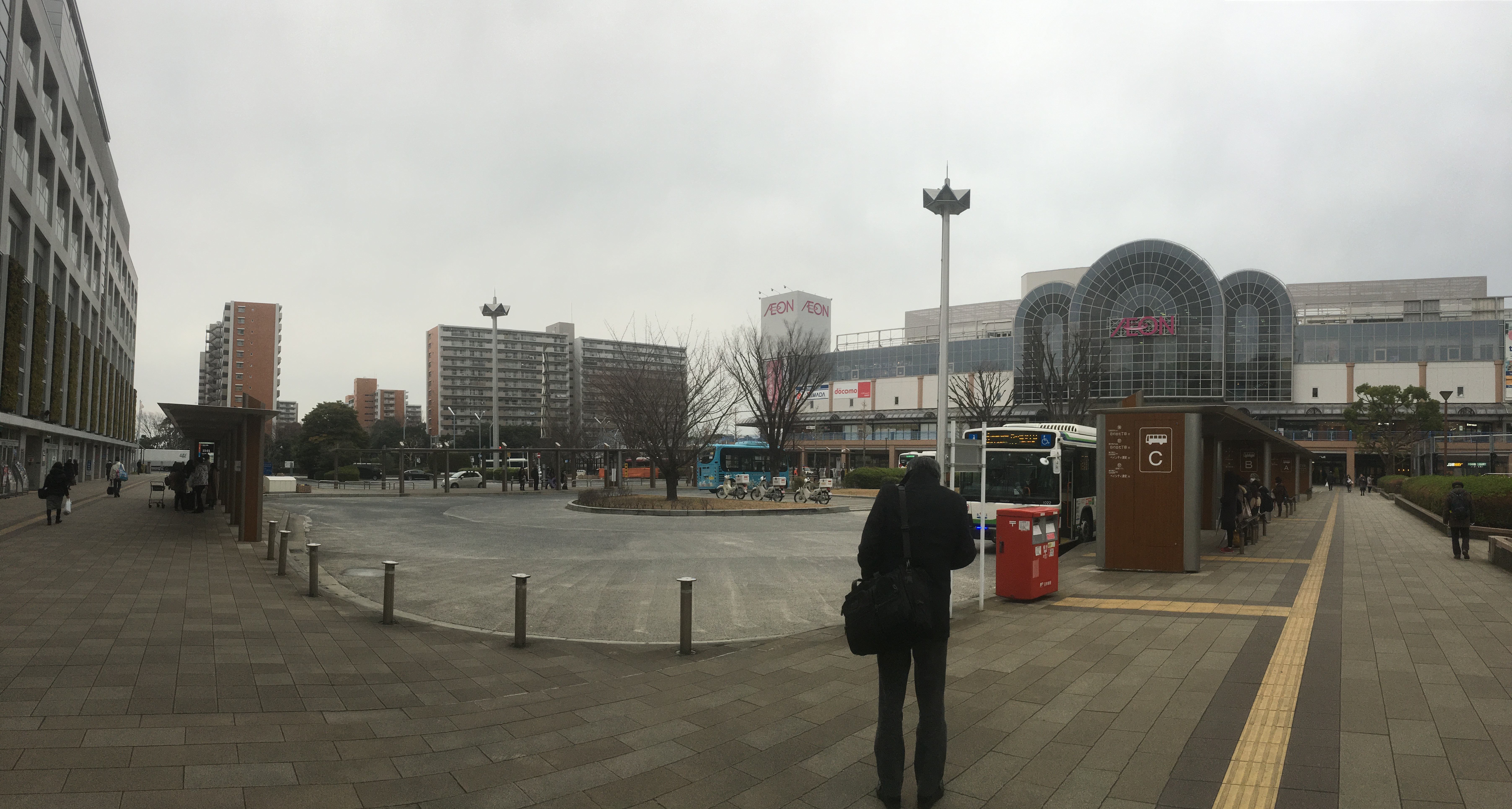 新浦安駅のバス乗り場 (Shin-Urayasu bus terminal)